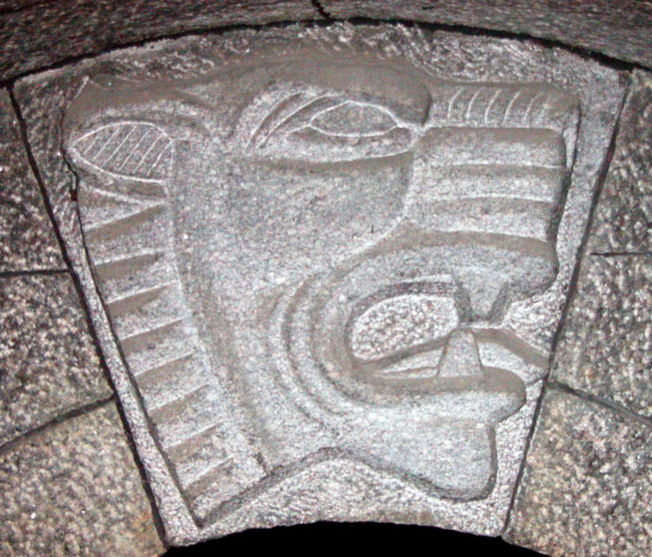 Braunschweiger Dom, Löwenkopf von Arno Breker in der Gruft Heinrichs des Löwen.